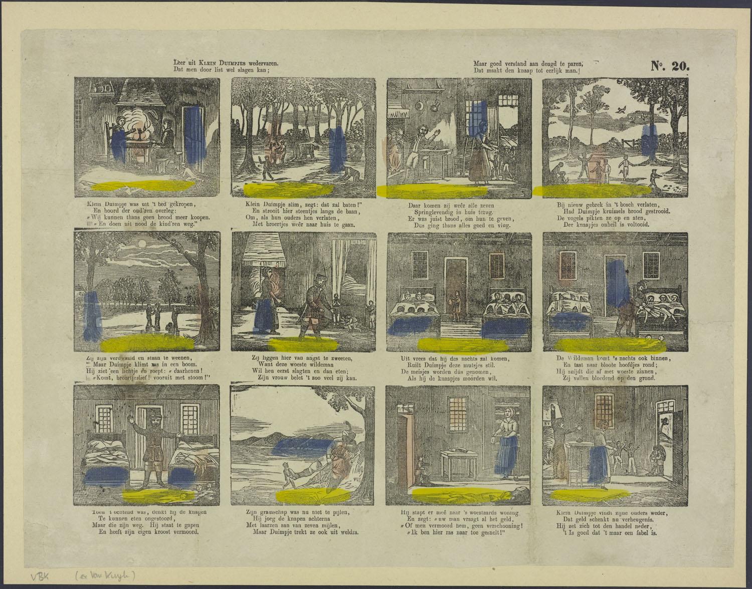 Oblong centsprent met 3 x 4 houtsneden, een bewerking van het sprookje van Perrault, waarin de ouders hun kinderen in het bos achterlaten. De eerste keer strooit Klein Duimpje steentjes en vind de weg terug, de tweede keer stukjes brood en dan verdwalen ze. Bij een reus verwisselt Duimpje de mutsjes van de dochters, en de reus snijdt de hoofden van zijn dochters af. Duimpje trekt de laarzen van de reus aan, gaat naar diens huis en eist geld. Dan vindt hij het ouders weer.